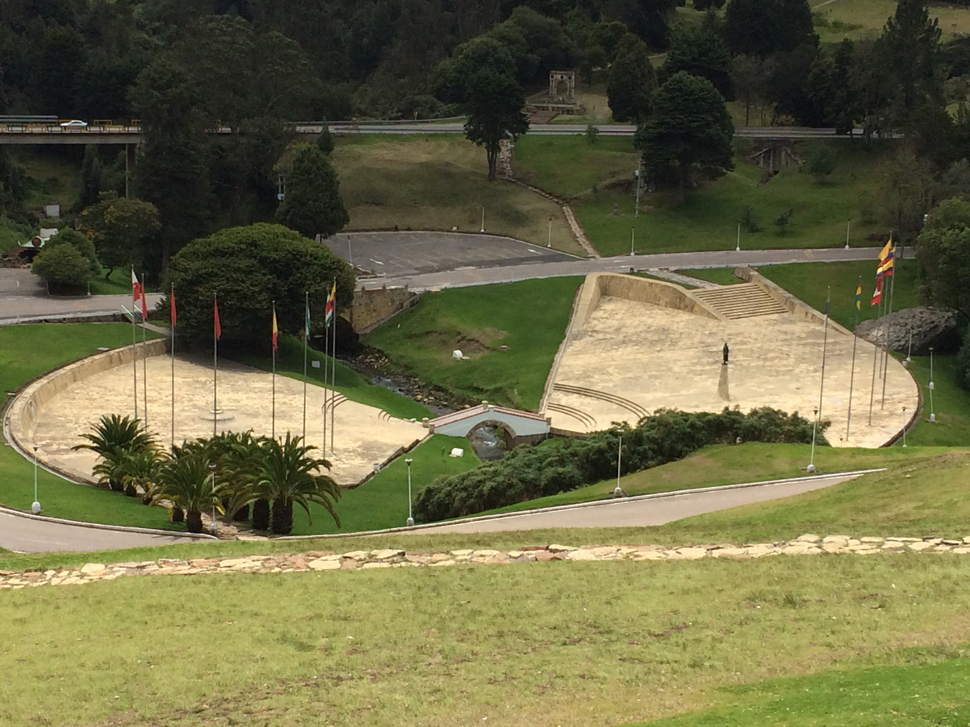 Vista panoramica